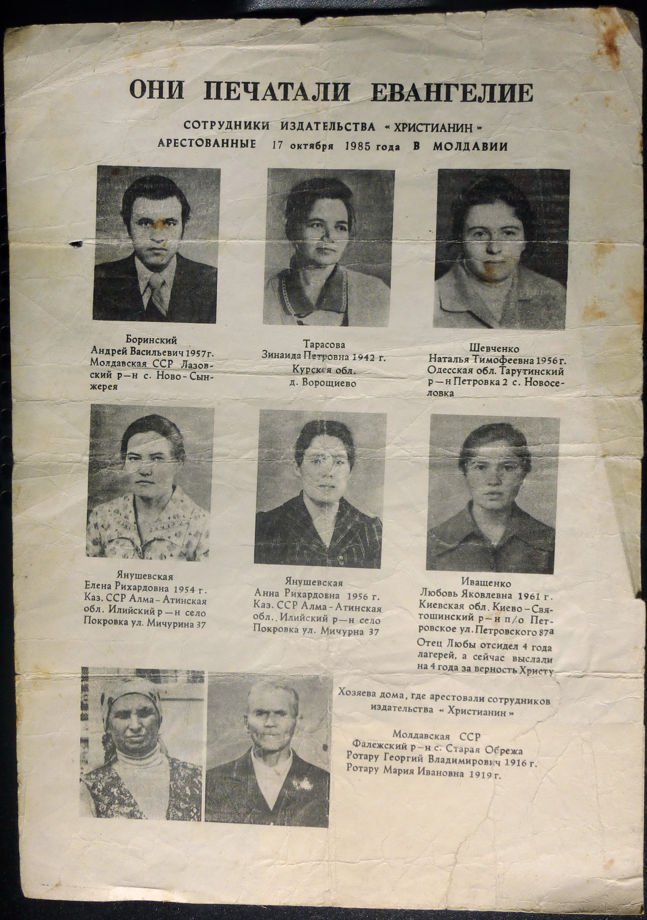 Информационная листовка Международного союза церквей евангельских христиан-баптистов (1985 год)